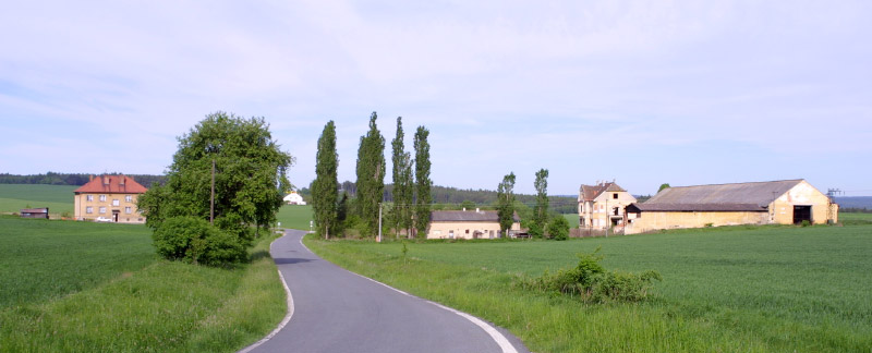 Hospodářský dvůr Březsko na severovýchodě okresu Plzeň-sever.